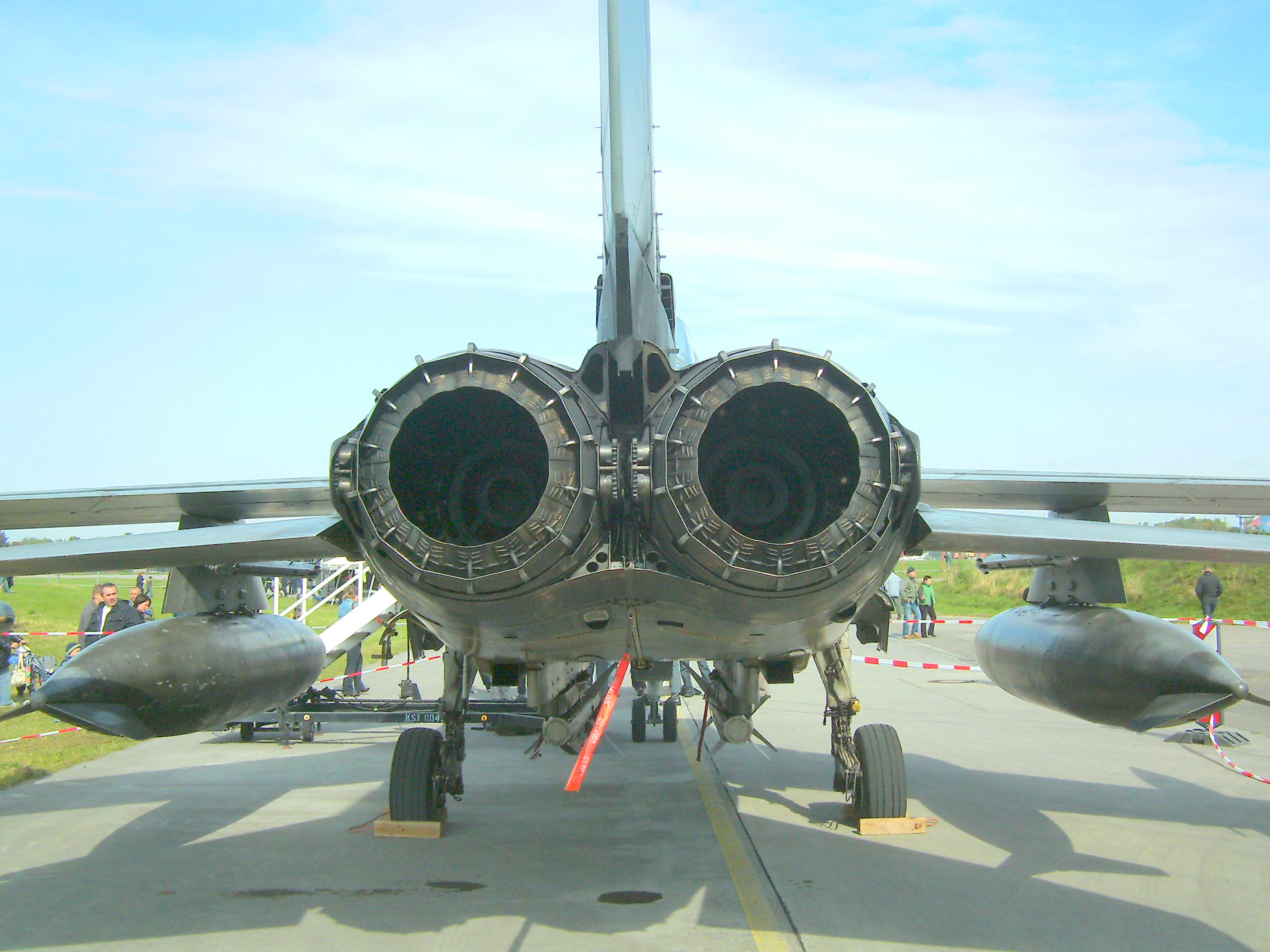 Tag der offenen Tür Allgäu Airport 2008 - Triebwerke Tornado